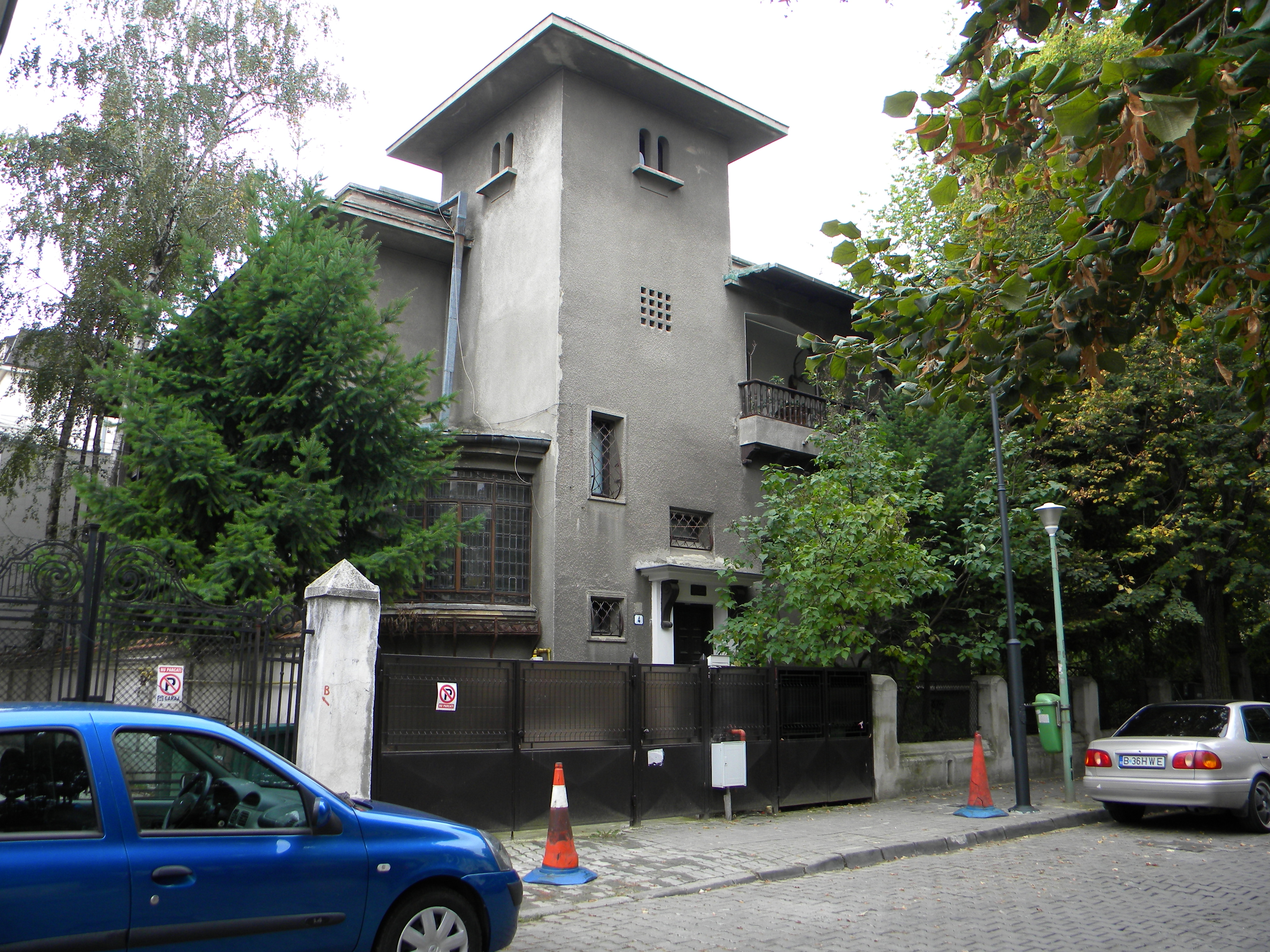 Bucuresti, Romania, Str. Belgrad nr. 4 (Casa); B-II-m-B-18121